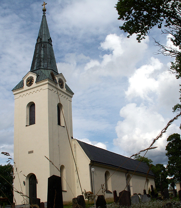 Foto: Gustaf Eriksson Datum: 14 juli 2005 Beskrivning: Fläckebo kyrka 14 juli 2005 kl.22.56 Zoeds 600x691 (197016 bytes) (Fläckebo kyrka)